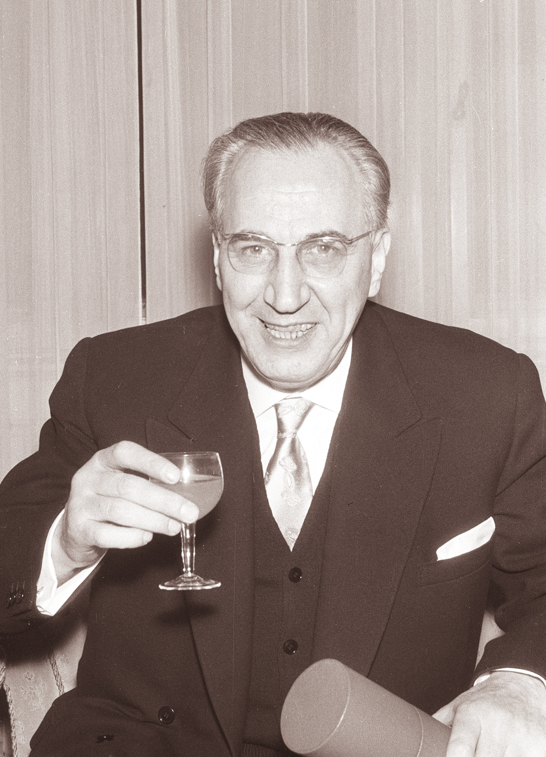 Vladimir Skrbinšek